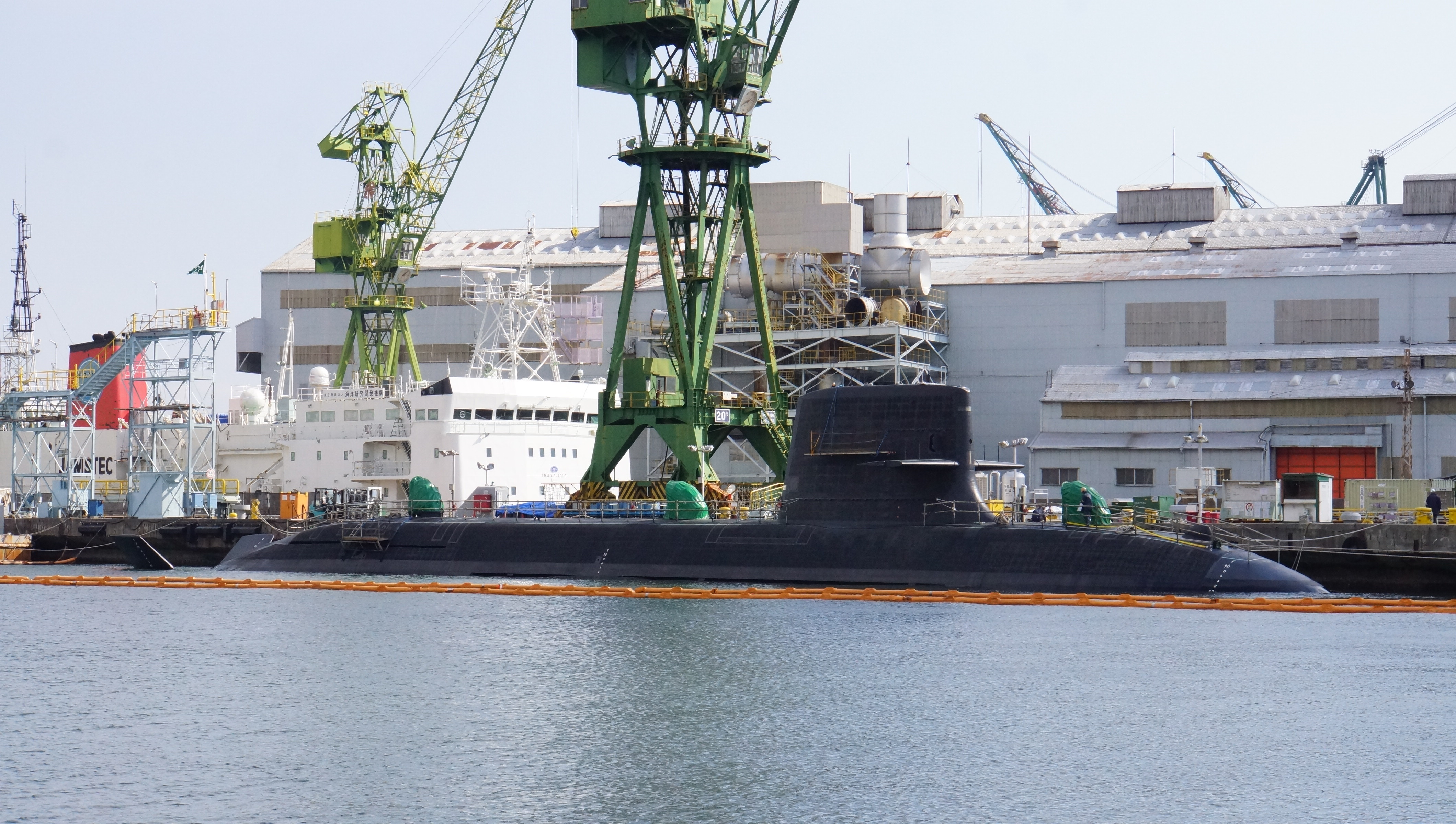 海上自衛隊 潜水艦こくりゅう（SS-506）。 15年2月14日 川崎重工神戸工場にて。